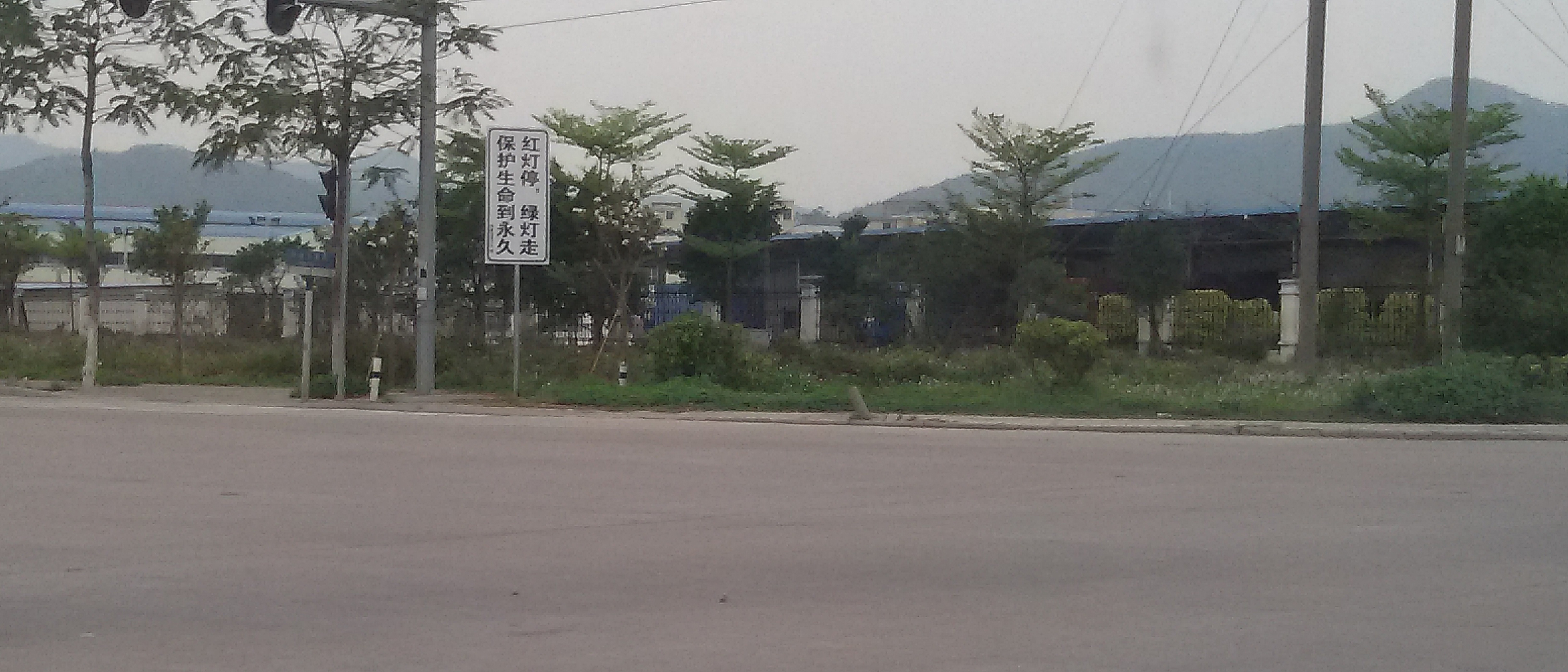 粵語: 花都嘅平步大道